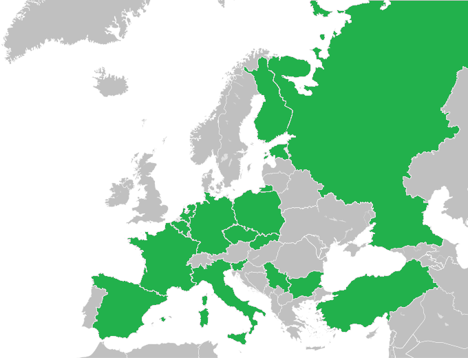 Reprezentacje biorące udział w Mistrzostwach Europy w Piłce Siatkowej Mężczyzn 2017.